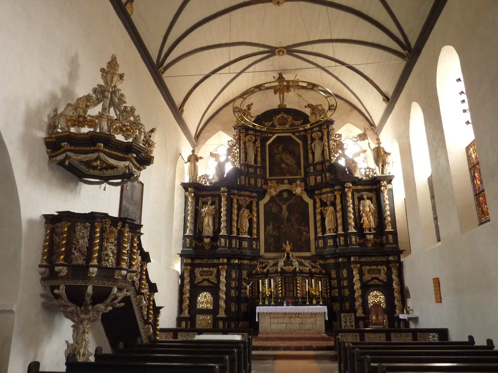 St. Peter und Paul (Hadmersleben)